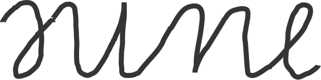 pisano devet (nine) koje zadrzava isti zapis i kada se okrene